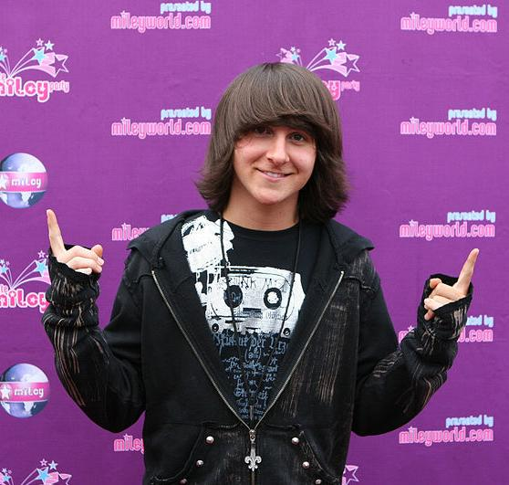 Hannah Montana's TV boyfriend Oliver?